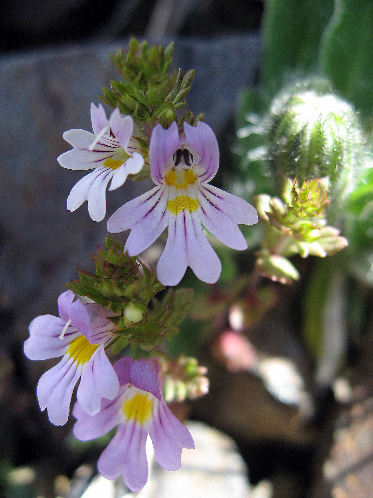 Salzburger Augentrost (Euphrasia salisburgensis)